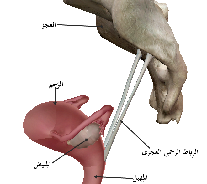 صُورة تشريحية تُظهر الرباط الرحمي العجزي